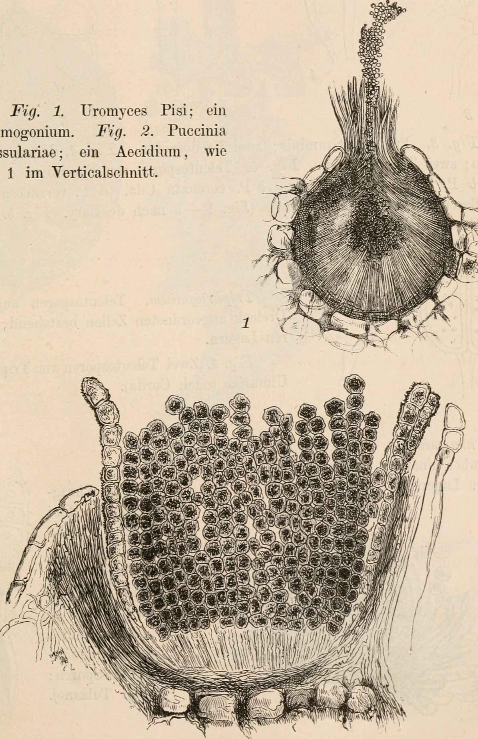 Fig. 1. Uromyces Pisi; ein Spermogonium. Fig. 2. Puccinia Grossulariae; ein Aecidium, wie Fig. 1 im Verticalschnitt.